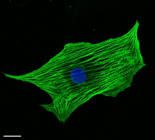 תא לב ממקור תאי גזע עובריים